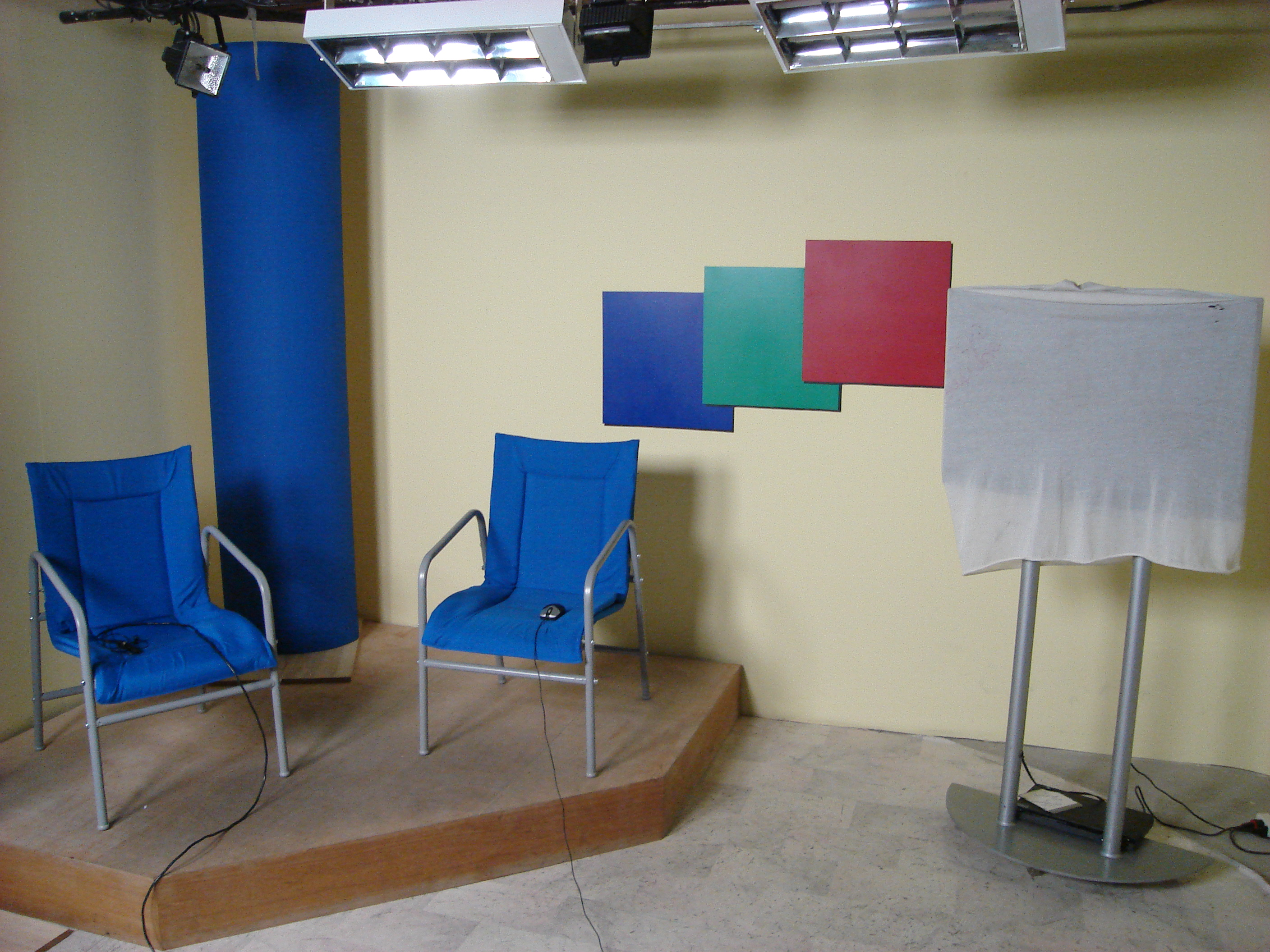 Estúdio do Jornal do Meio-Dia, da TV Pampa Sul, canal 13 VHF de Pelotas, Brasil.